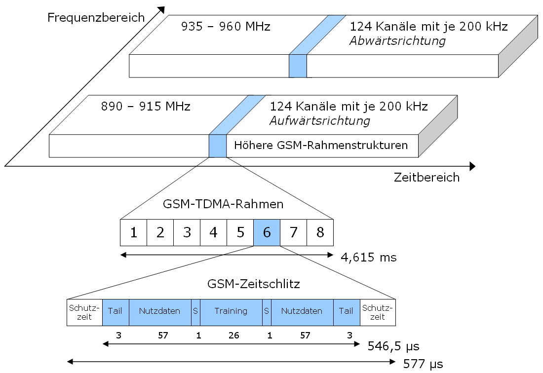 GSM Rahmenstruktur - selber gezeichnet, GNU FDL